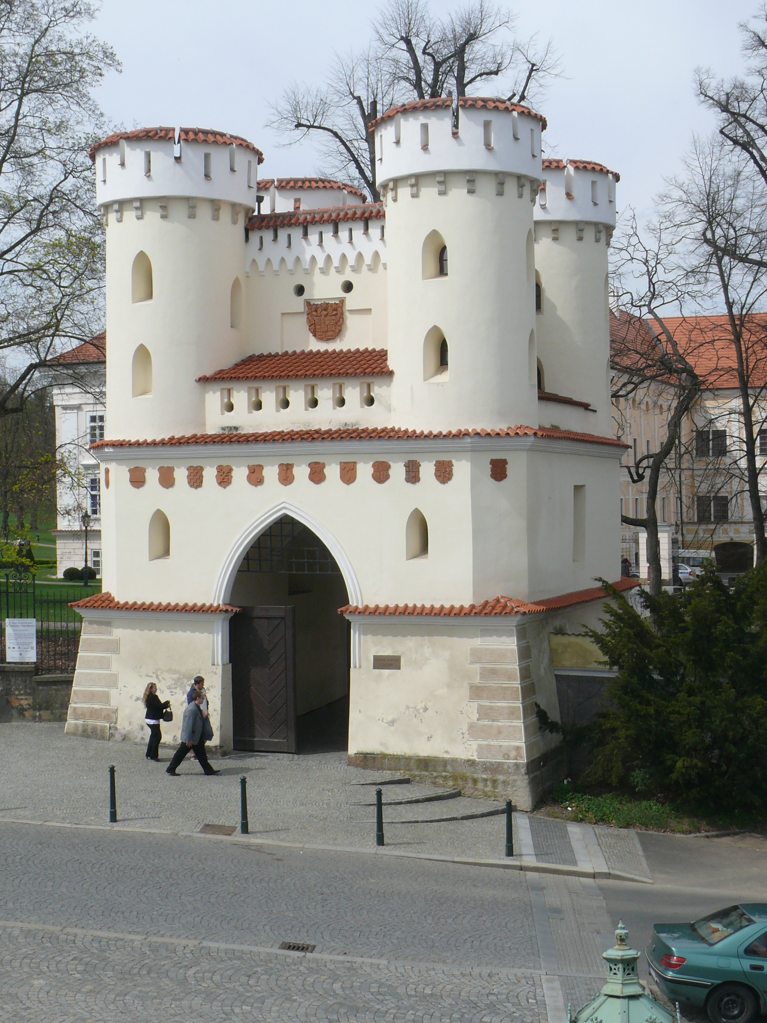 Podblanická galerie sídlící ve Vlašimské bráně.